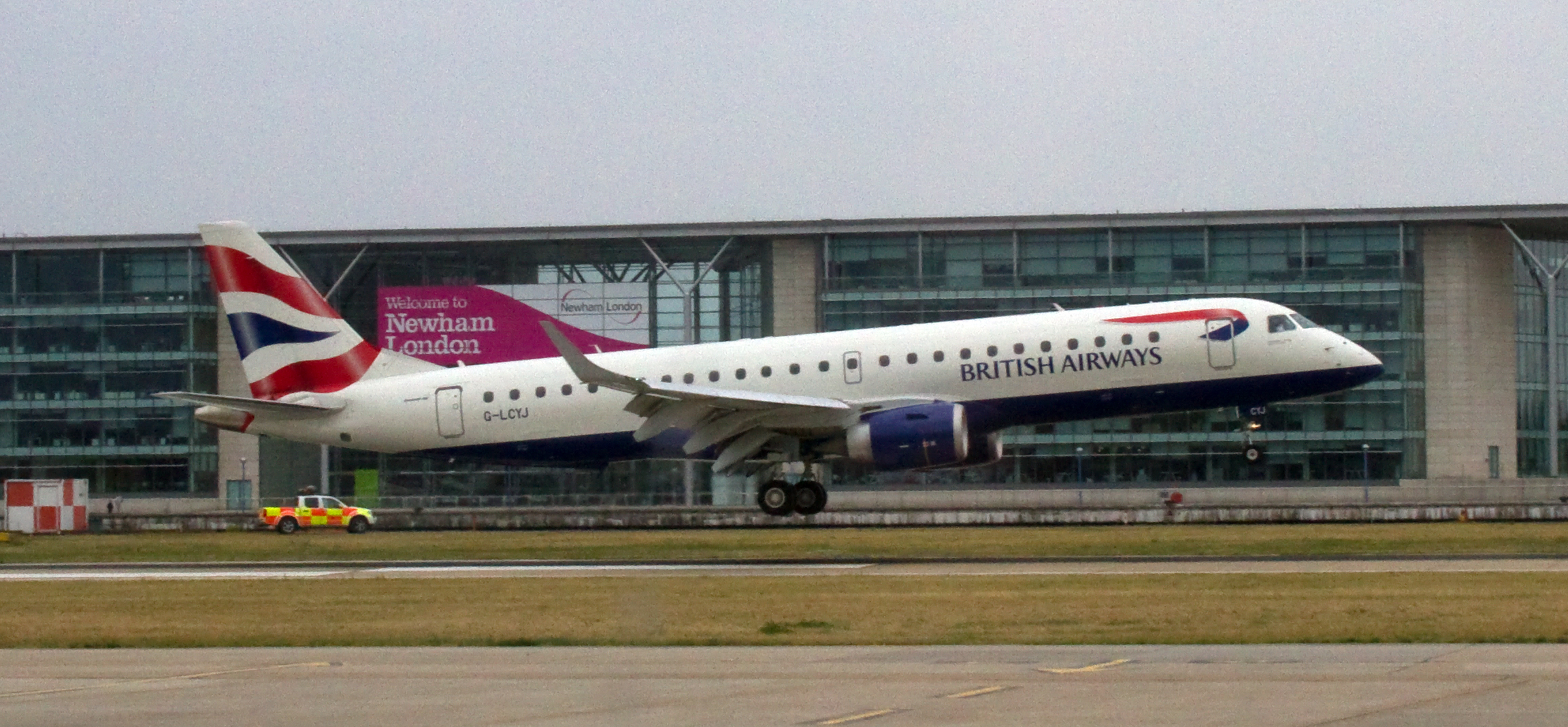 G-LCYJ